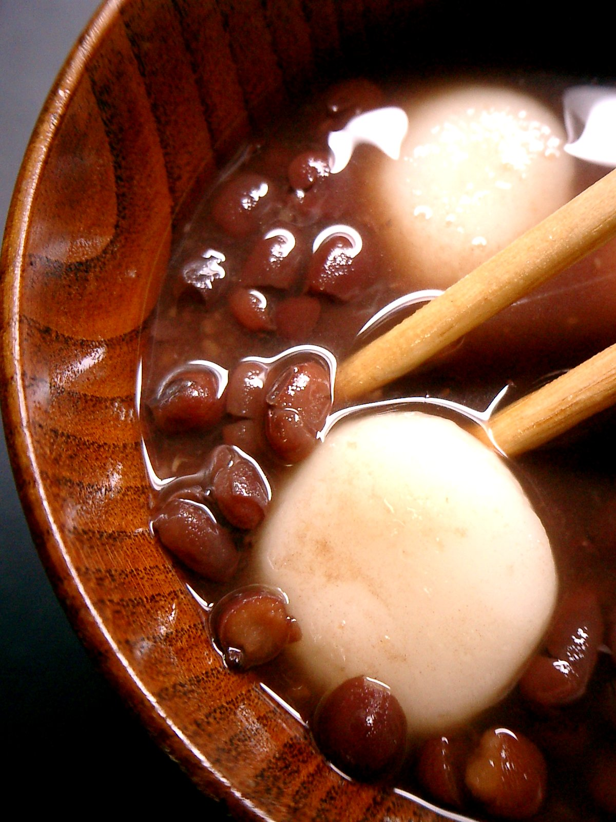 Shiruko(Zenzai) - Traditional Japanese dessert